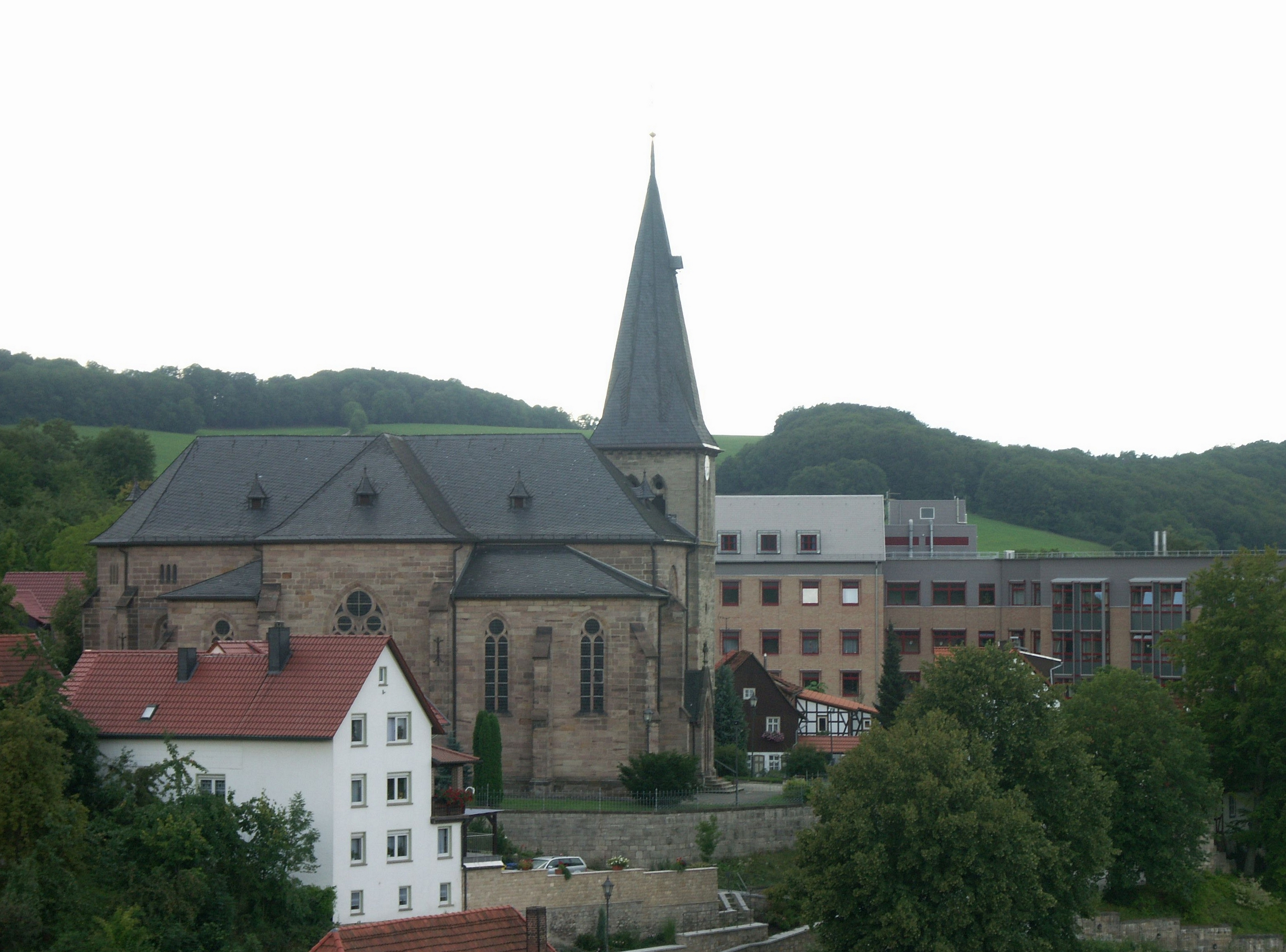 Kirche in Lengenfeld unterm Stein im südlichen Eichsfeld, dahinter die Krankenhaus